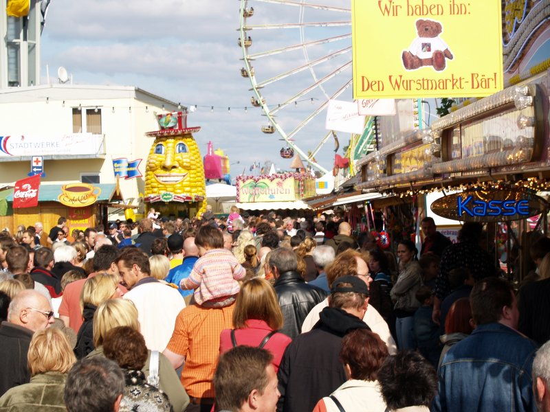 Dürkheimer Wurstmarkt 2008